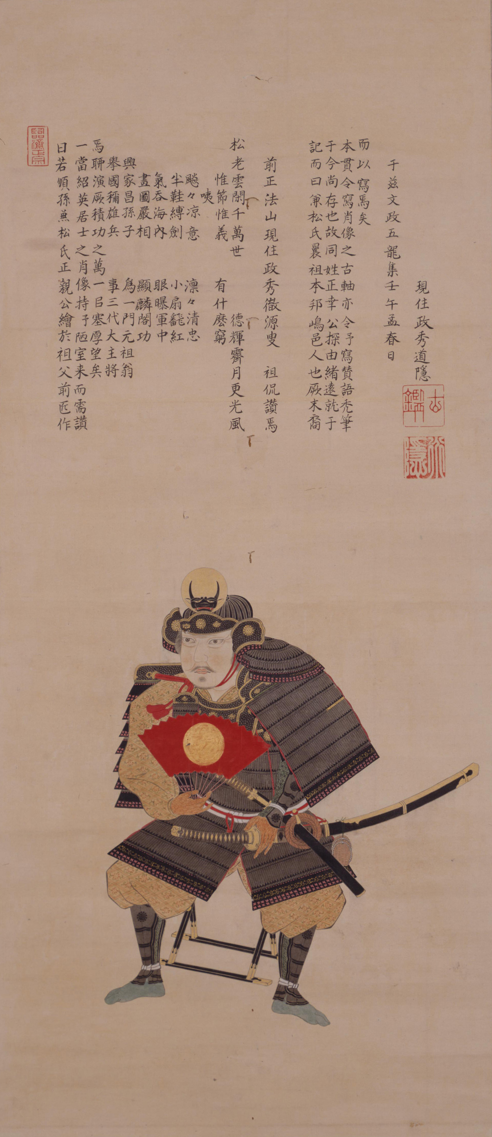 兼松正吉の肖像。